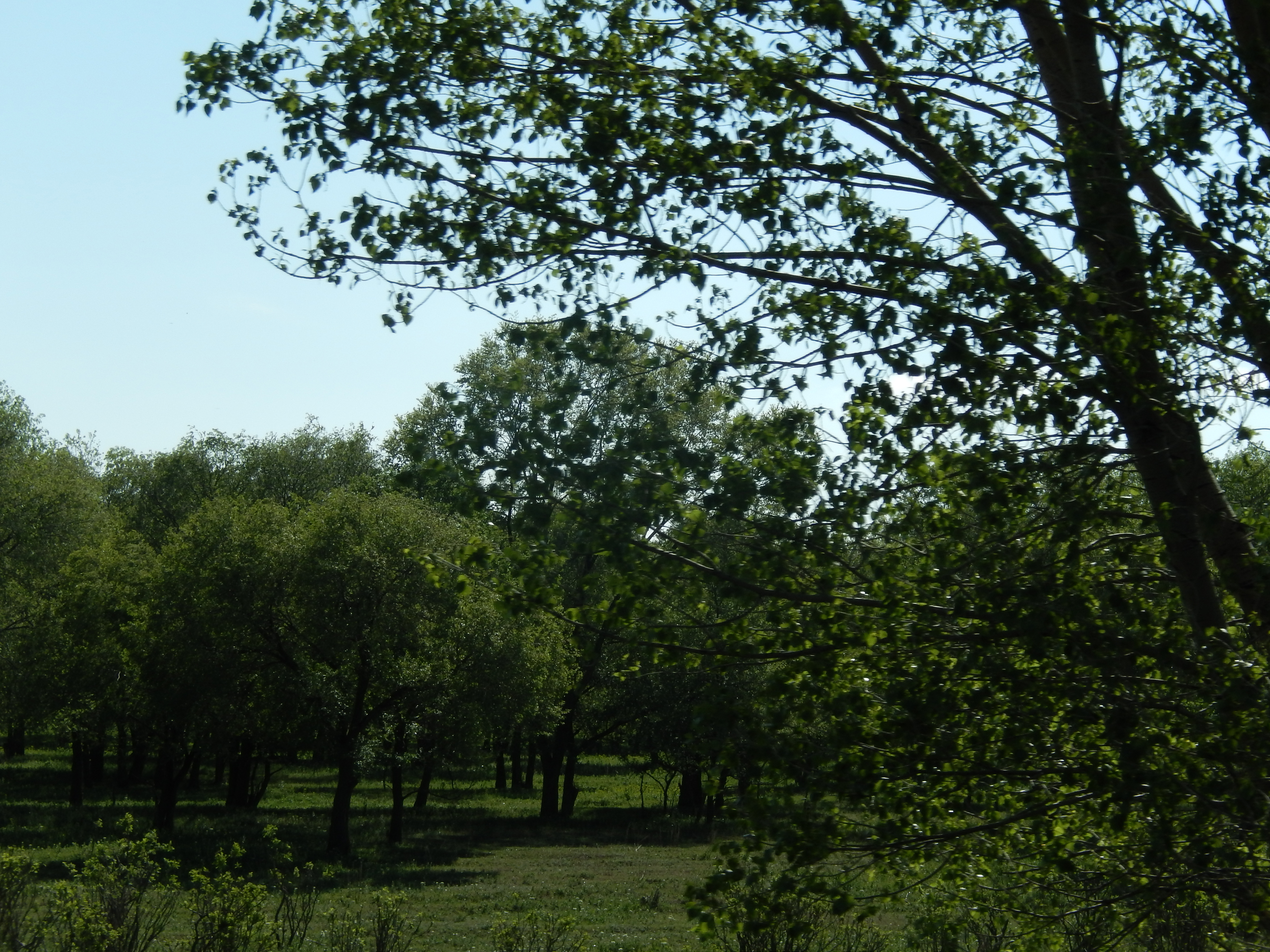 Գիհու նոսրանտառային արգելավայր